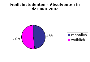 Humandmedizinstudenten in der BRD 2002